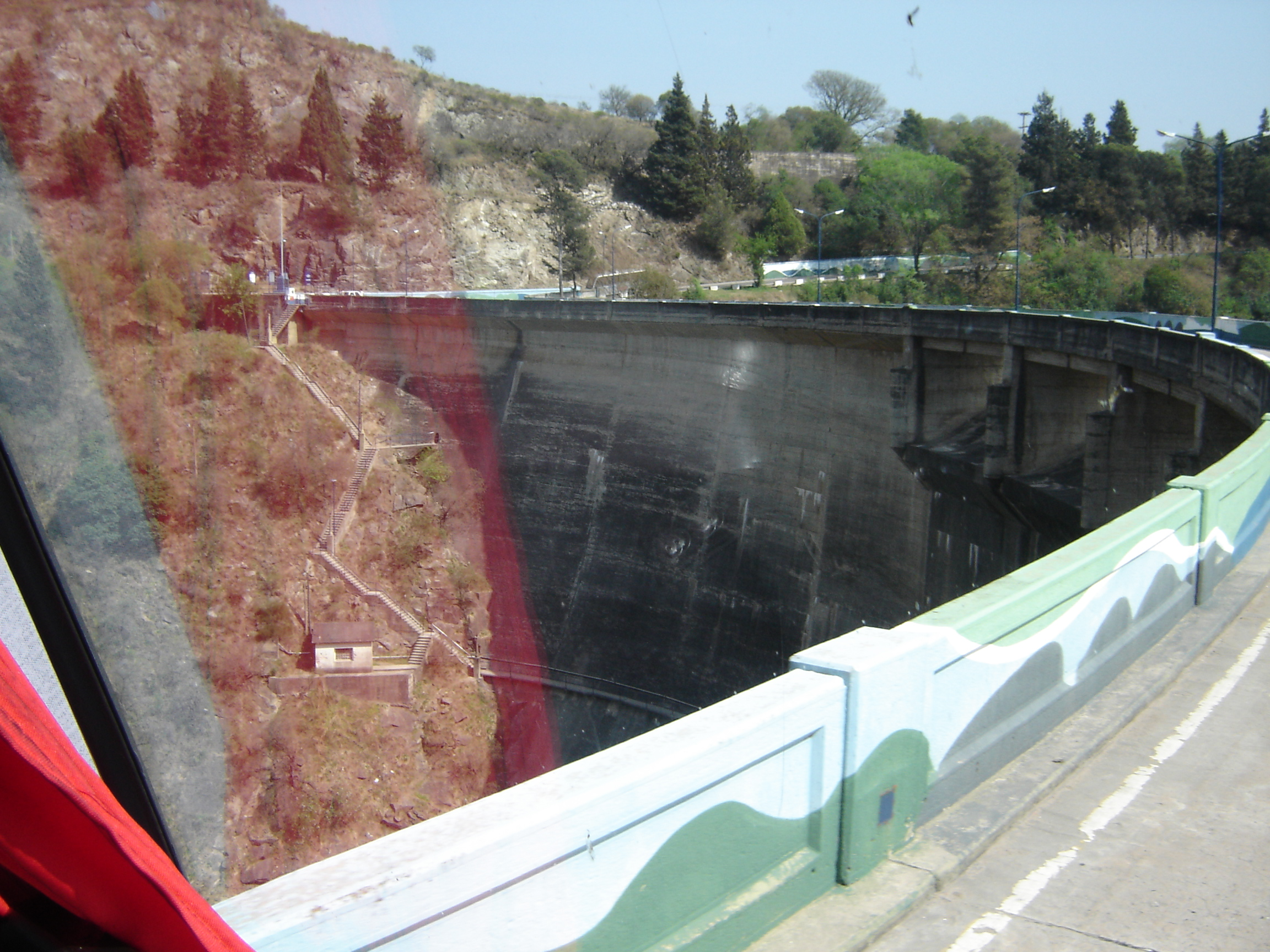 Dique Los Molinos